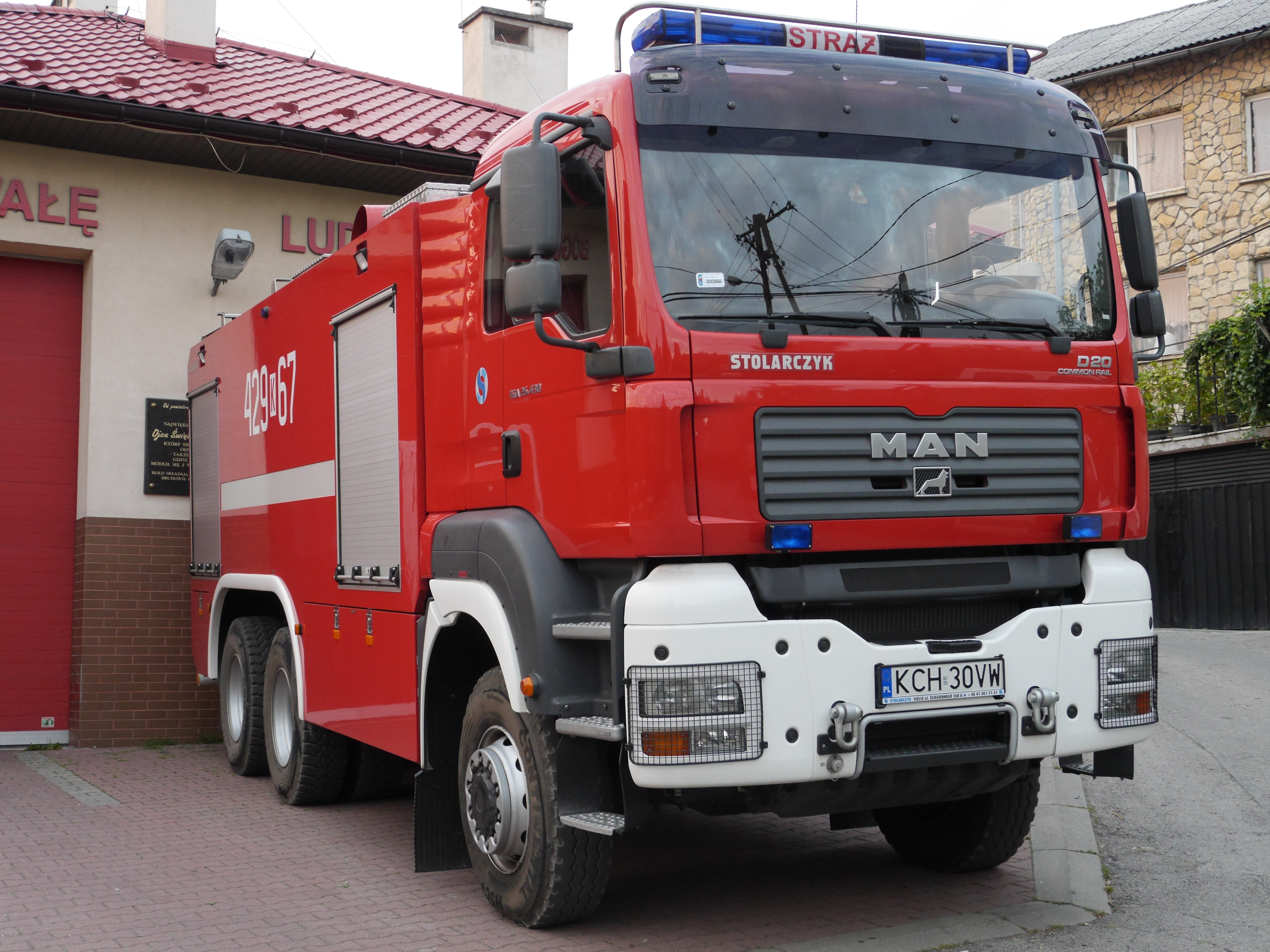 OSP Psary This photo was taken with Panasonic Lumix DMC-GH3 camera, thanks to Panasonic.You can see all photographs in category: Taken with Panasonic Lumix DMC-GH3.